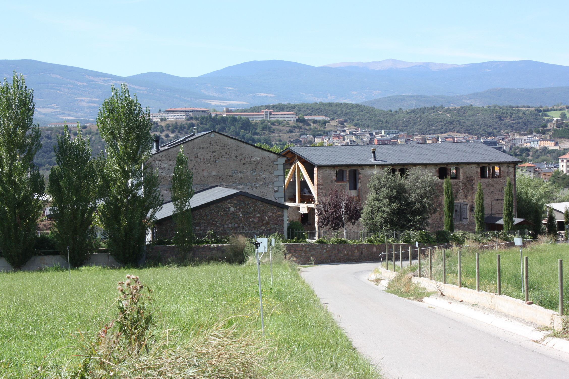 Borda de Cal Lleó, a la partida de Sardina de la Seu d'Urgell.